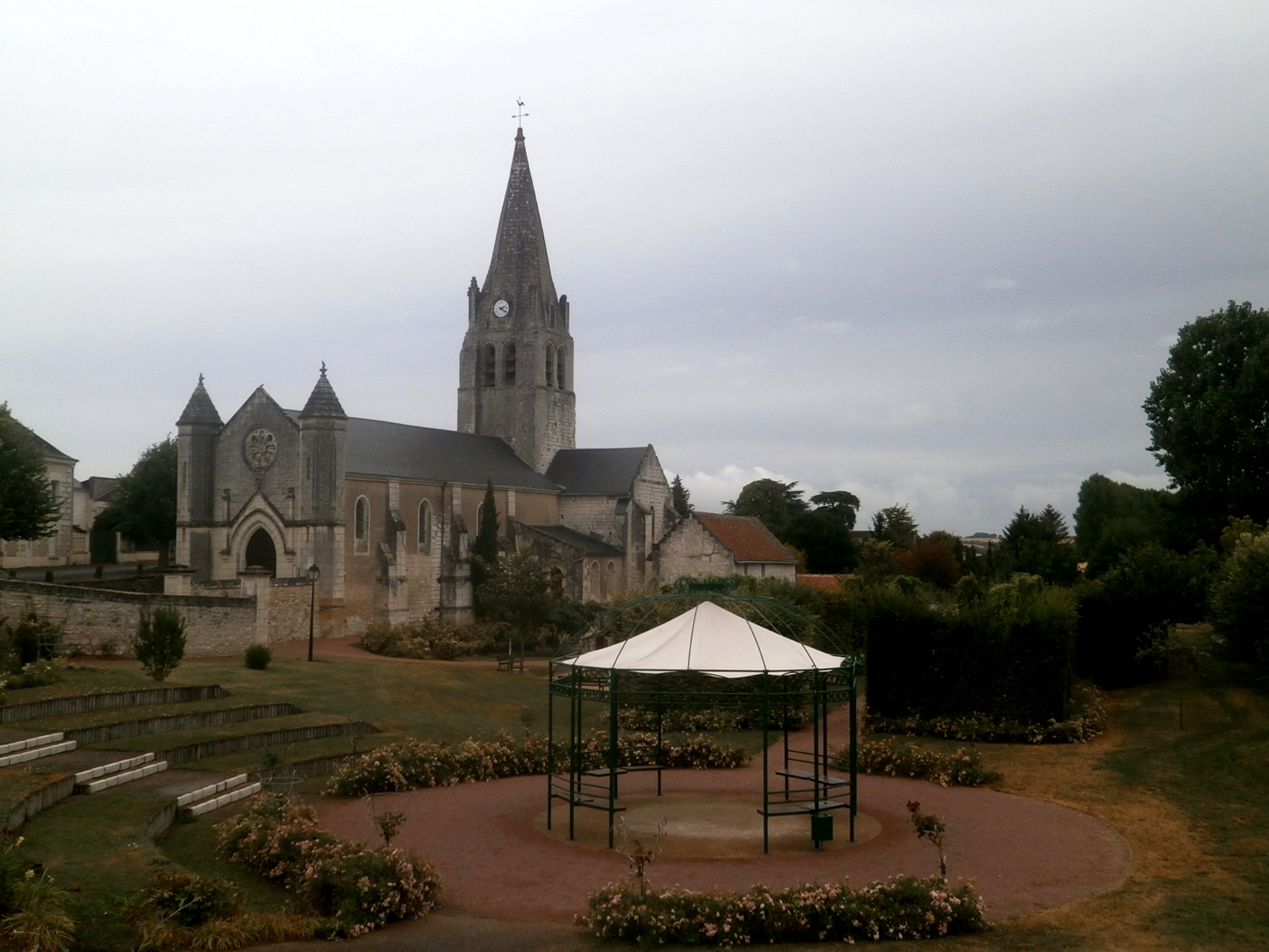 Vue partielle du village